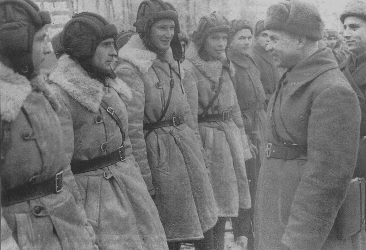 Командир 1-й Московской гвардейской мотострелковой дивизии А. И. Лизюков беседует с танкистами накануне боя. Западный фронт, ноябрь 1941.